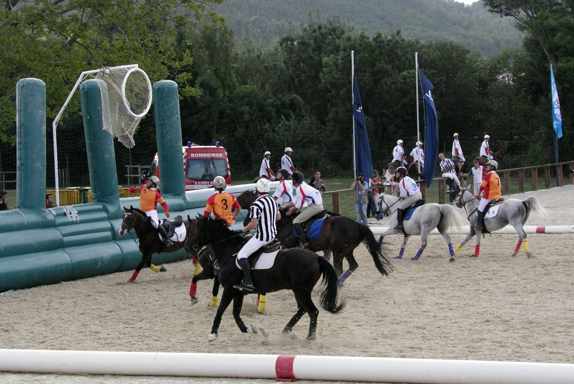 FIHB-Horsball World Cup: Campenato do Mundo, Espanha - Inglaterra, Ponte de Lima 2008, Portugal